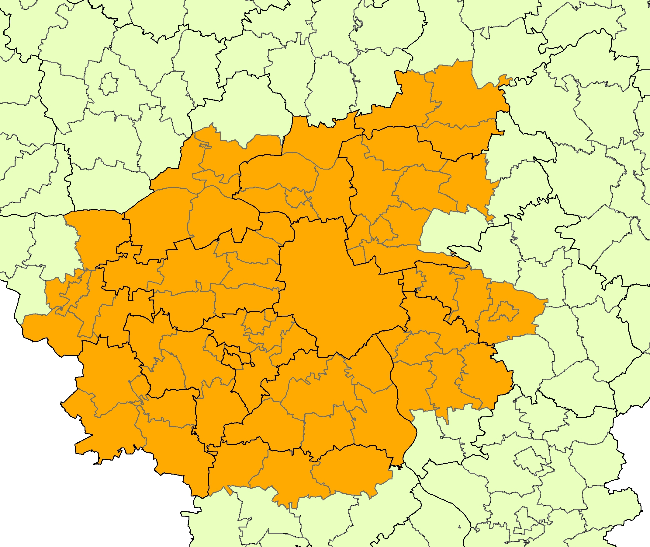 Obszar Metropolitalny Warszawy wyznaczony przez Mazowieckie Biuro Planowania Regionalnego i zatwierdzony w styczniu 2006 r. przez Zarząd Województwa Mazowieckiego